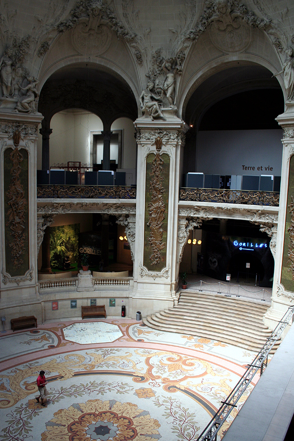 Musée de la découverte, Paris (the main hall)